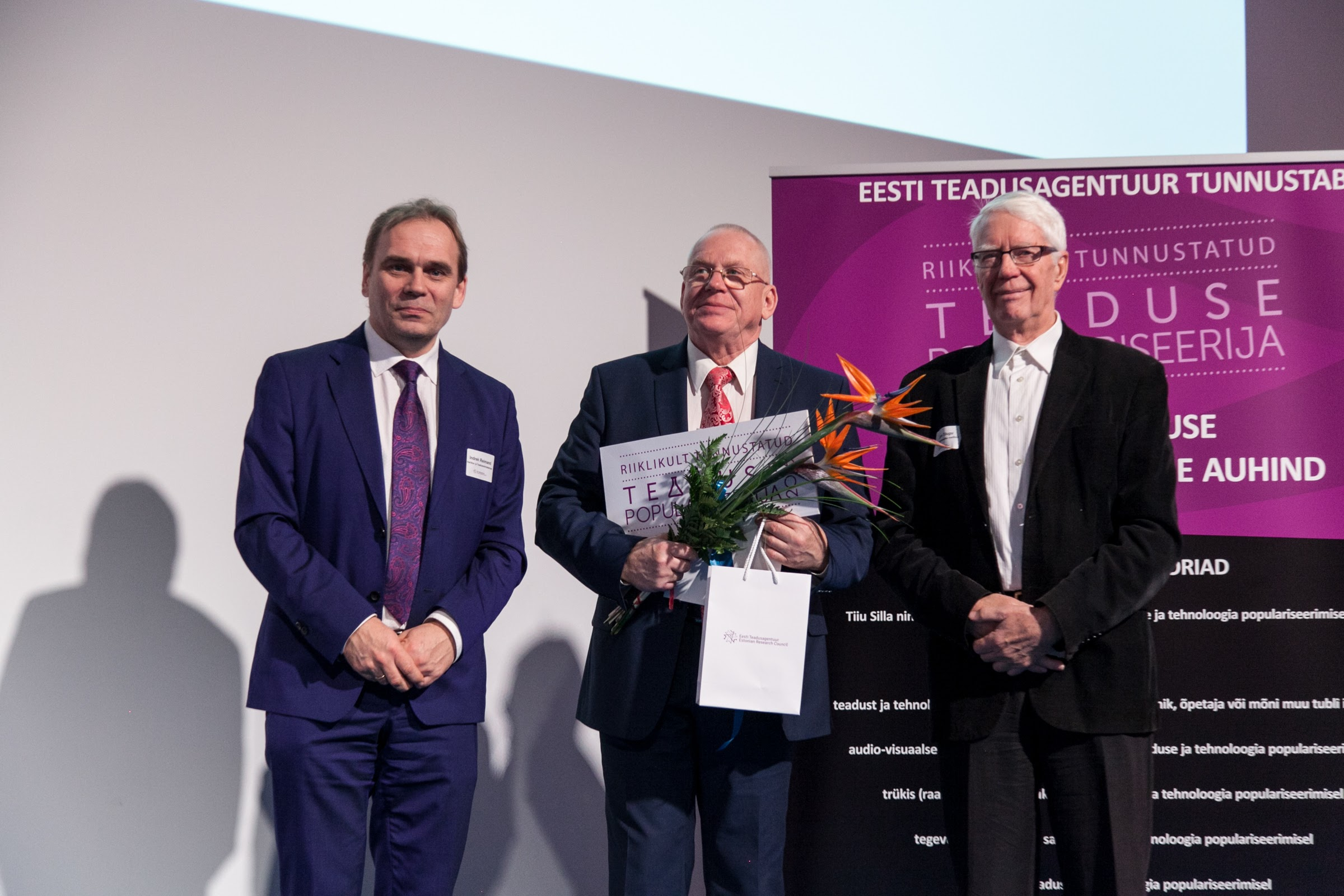 Peeter Lorents 2016. aasta teaduskommunikatsiooni konverentsil võtmas vastu teaduse populariseerimise auhinda.